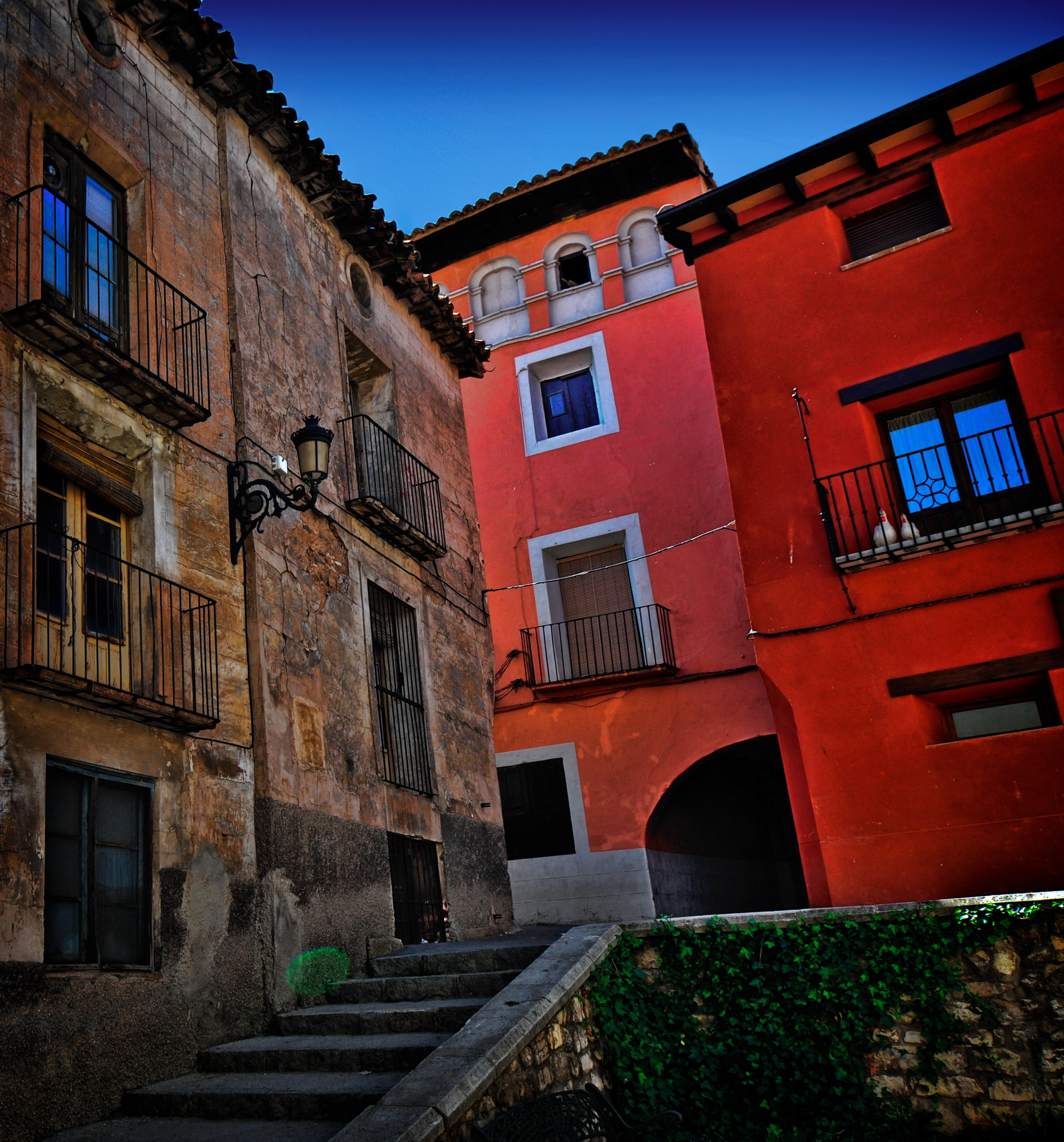 Se accede al Casco Histórico de la Villa por la antigua muralla que circundaba en viejo núcleo urbano, por el torreón conocido como Portal de Daroca, con un pórtico de planta baja. El interior de esta construcción se destinó a carcel en tiempos pasados por lo que también se le llama Torreón de la Carcel. Desde aquí da paso a una calle recta y estrecha, la más urbana y señorial con edificios solariegos y escudos heráldicos esculpidos en los sobreportales. Por esta calle se generan pasadizos cubiertos que ascienden hasta la "Era de la Cruz", elevación de terreno que junto con el lugar donde se localizan los restos del antiguo castillo de Montalbán, cerraban el perímetro defensivo. Esta calle muere en la Plaza Mayor que aparece subordinada al potente volumen y majestuosidad del templo La Iglesia de Santiago.